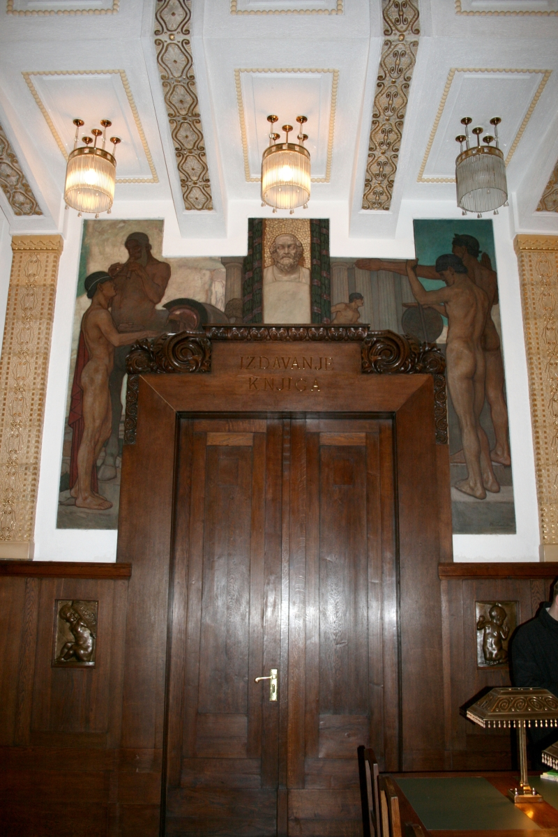 snimljeno tijekom Noći muzeja u Hrvatskom državnom Arhivu u Zagrebu